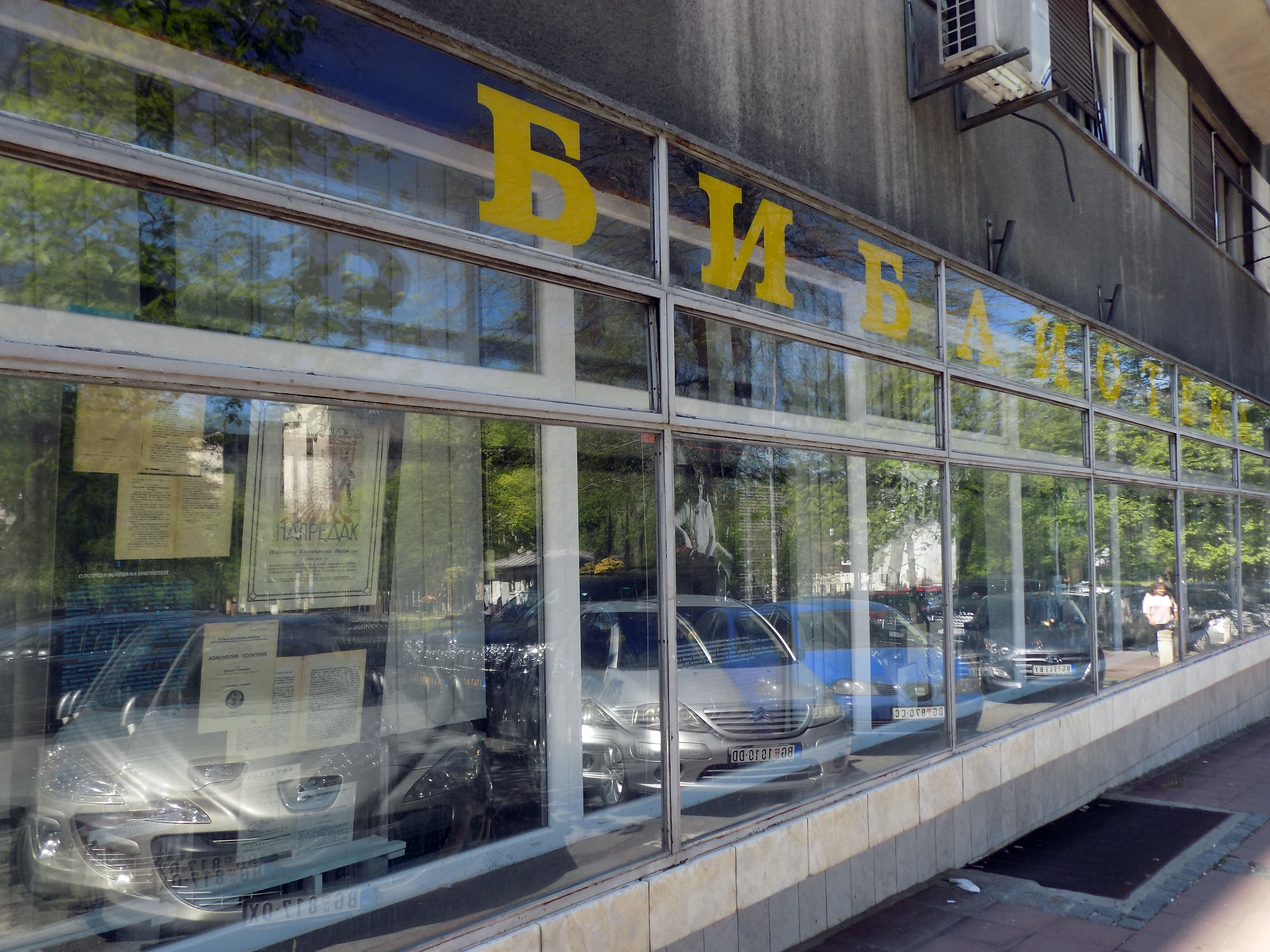 Biblioteka grada Beograda, Odeljenje periodike. Studentski trg 19, Beograd